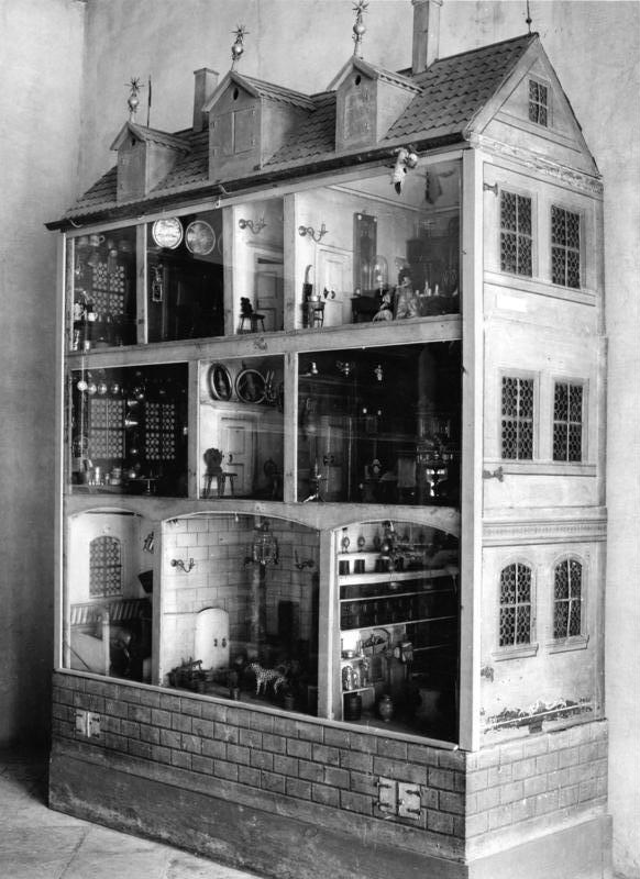 Germanisches Nationalmuseum in Nürnberg Nürnberger Puppenhaus aus dem Besitz der Familie Bäumler Ende 17. Jahrhundert.